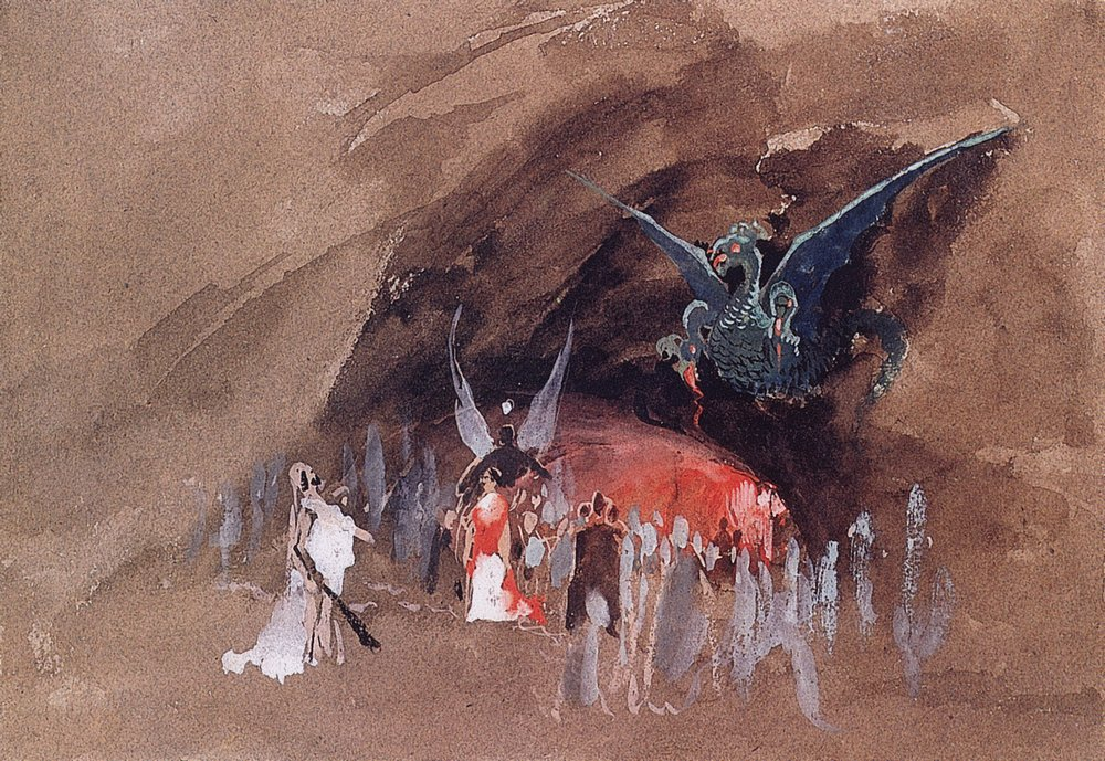 У пещеры дракона. 1880-е. Эскиз. Бумага серая, акварель, гуашь. 23,4x32,2 см. Государственный Русский музей, Санкт-Петербург